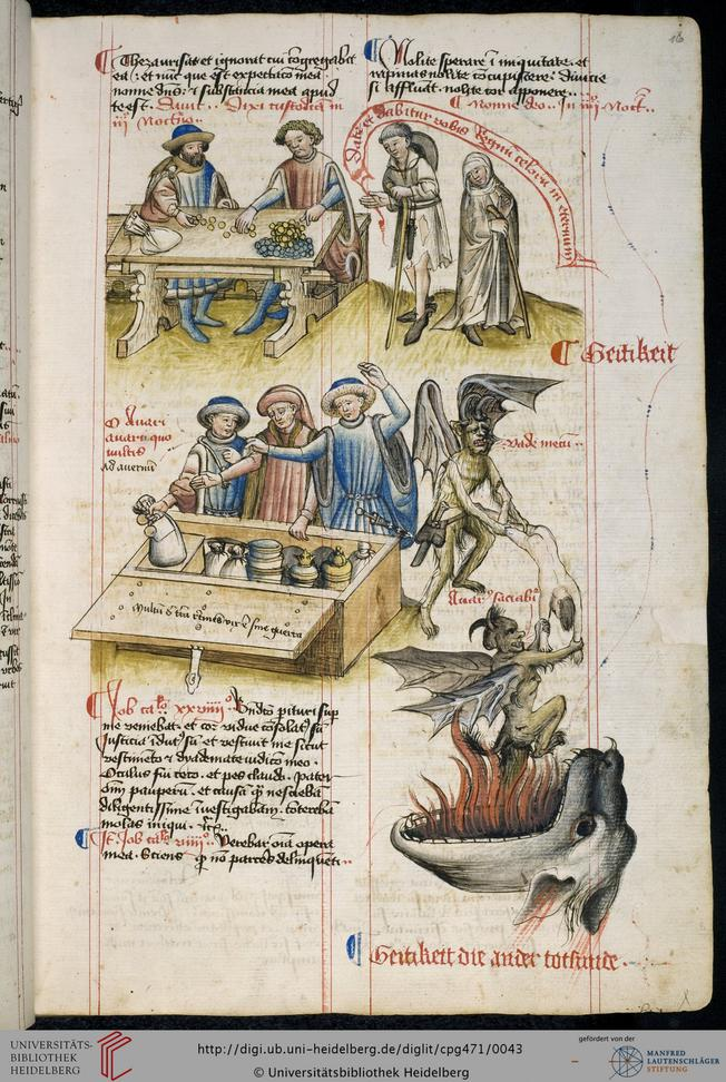 Hugo von Trimberg "Der Renner"